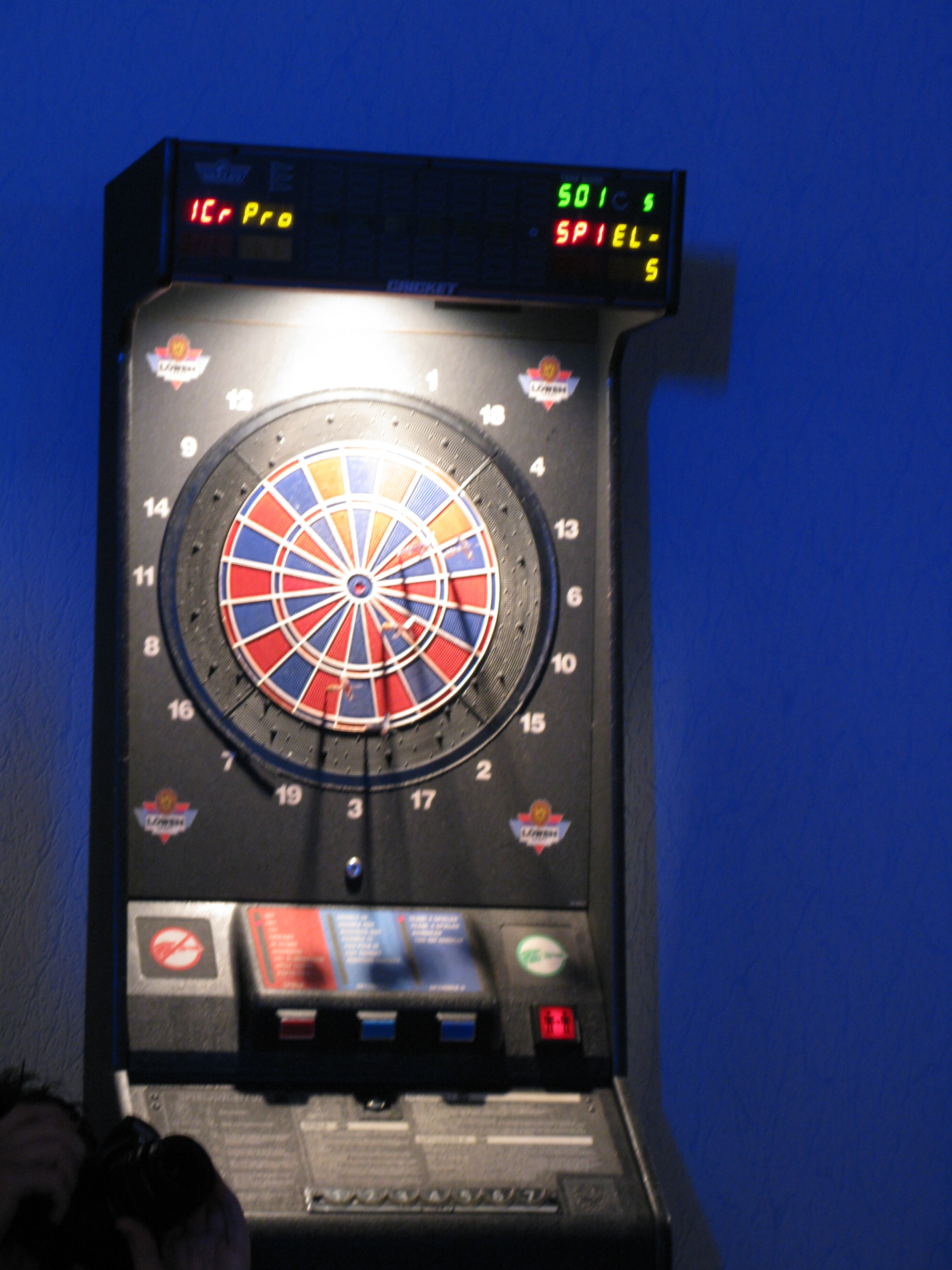 Softdartautomat